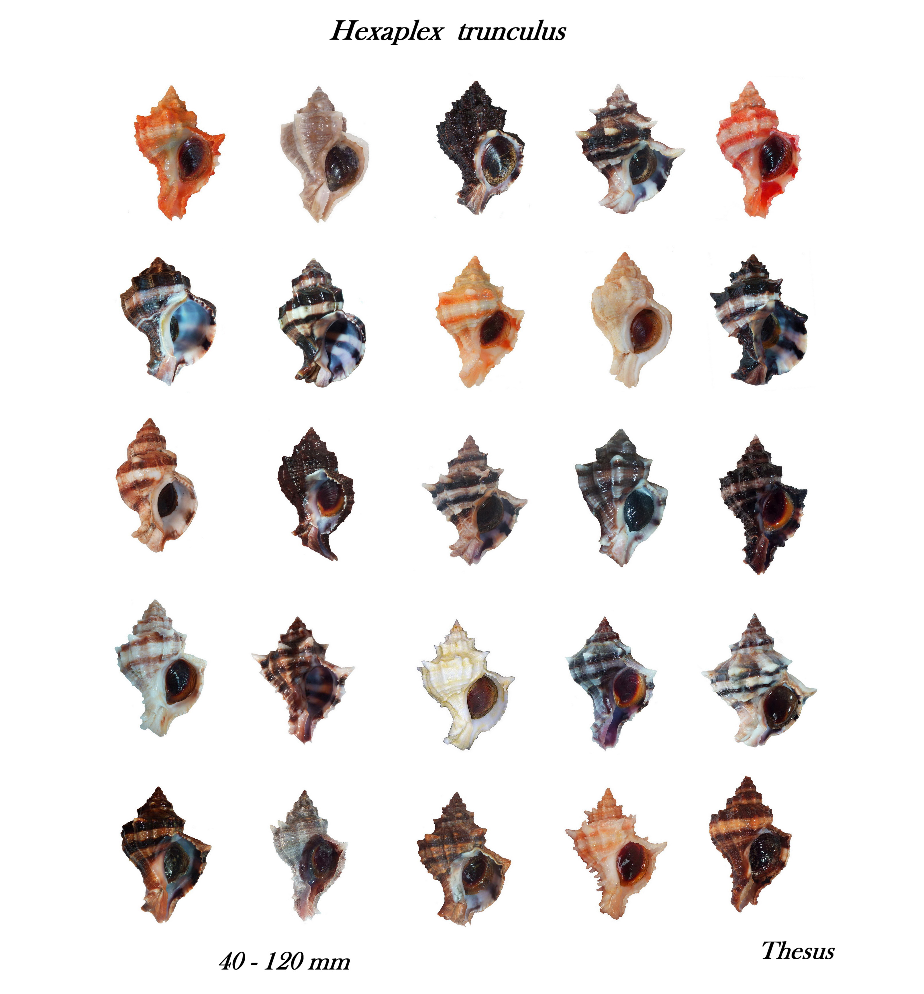 muricidae